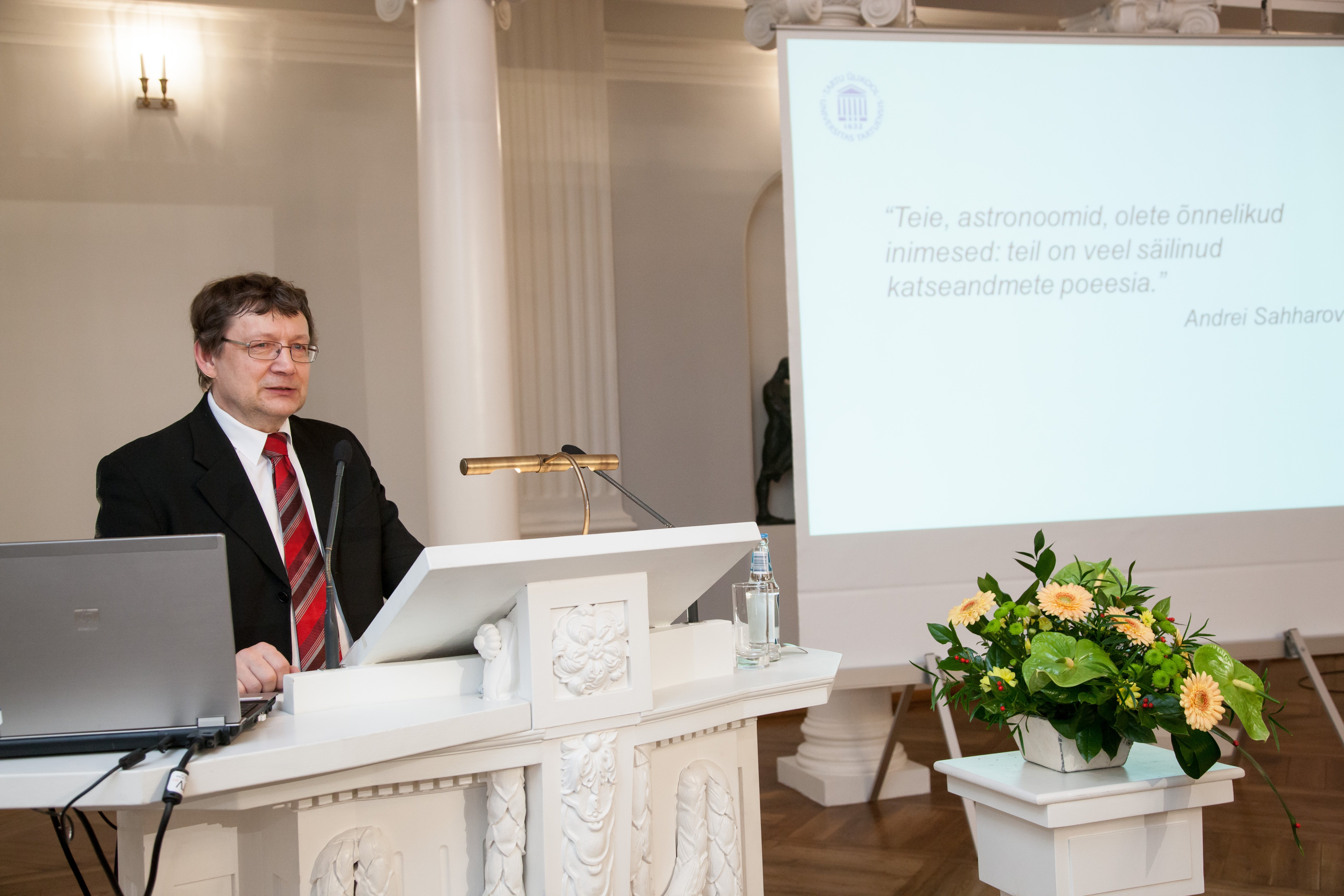 Tartu Ülikooli astrofüüsika professor Peeter Tenjes TÜ aulas pidamas inauguratsiooniloengut teemal "Nähtava ja tumeda aine jaotus galaktikates".